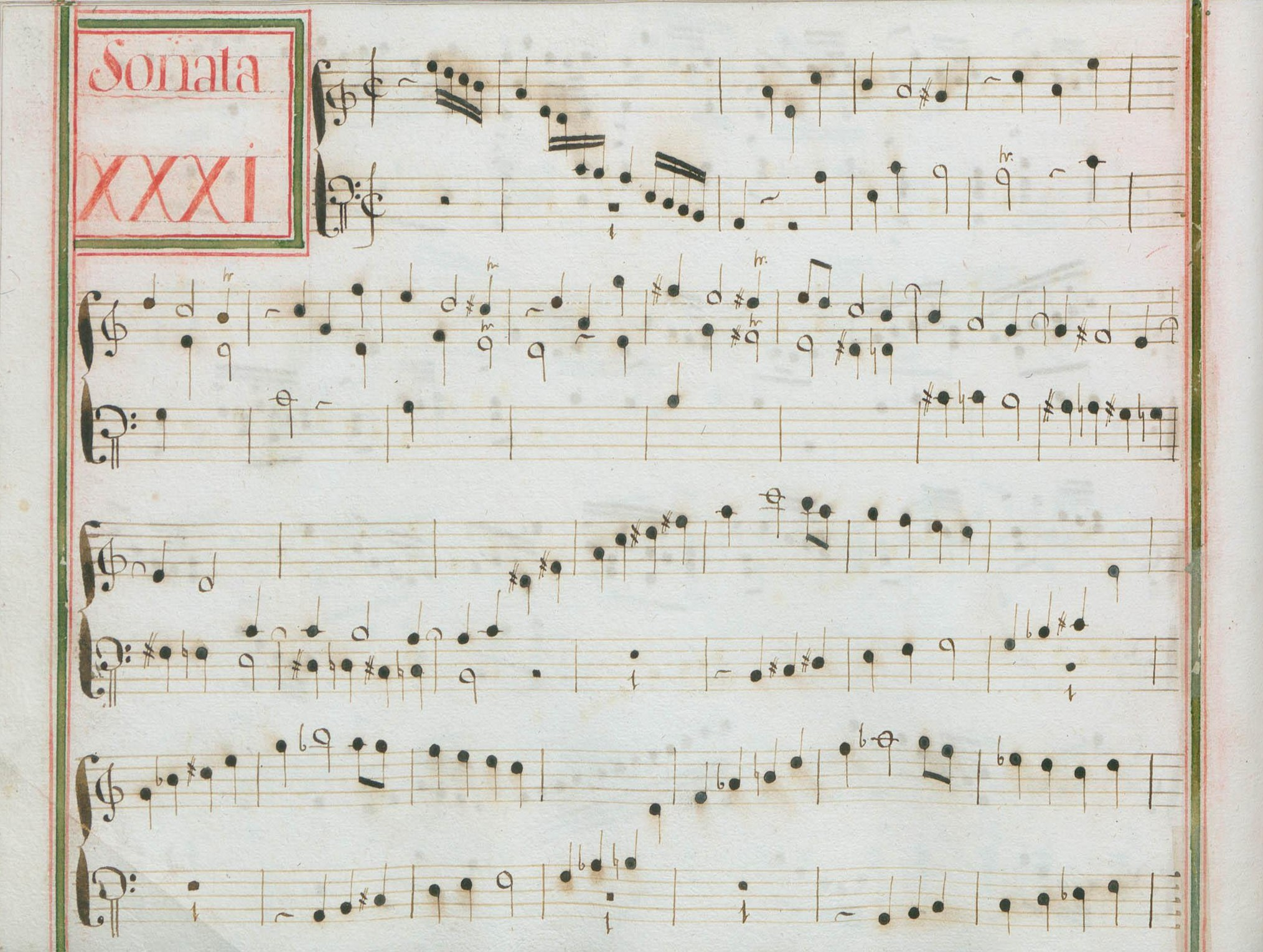 La sonate K. 3, telle qu'elle se présente dans le manuscrit de Venise, volume XIV no. 31.